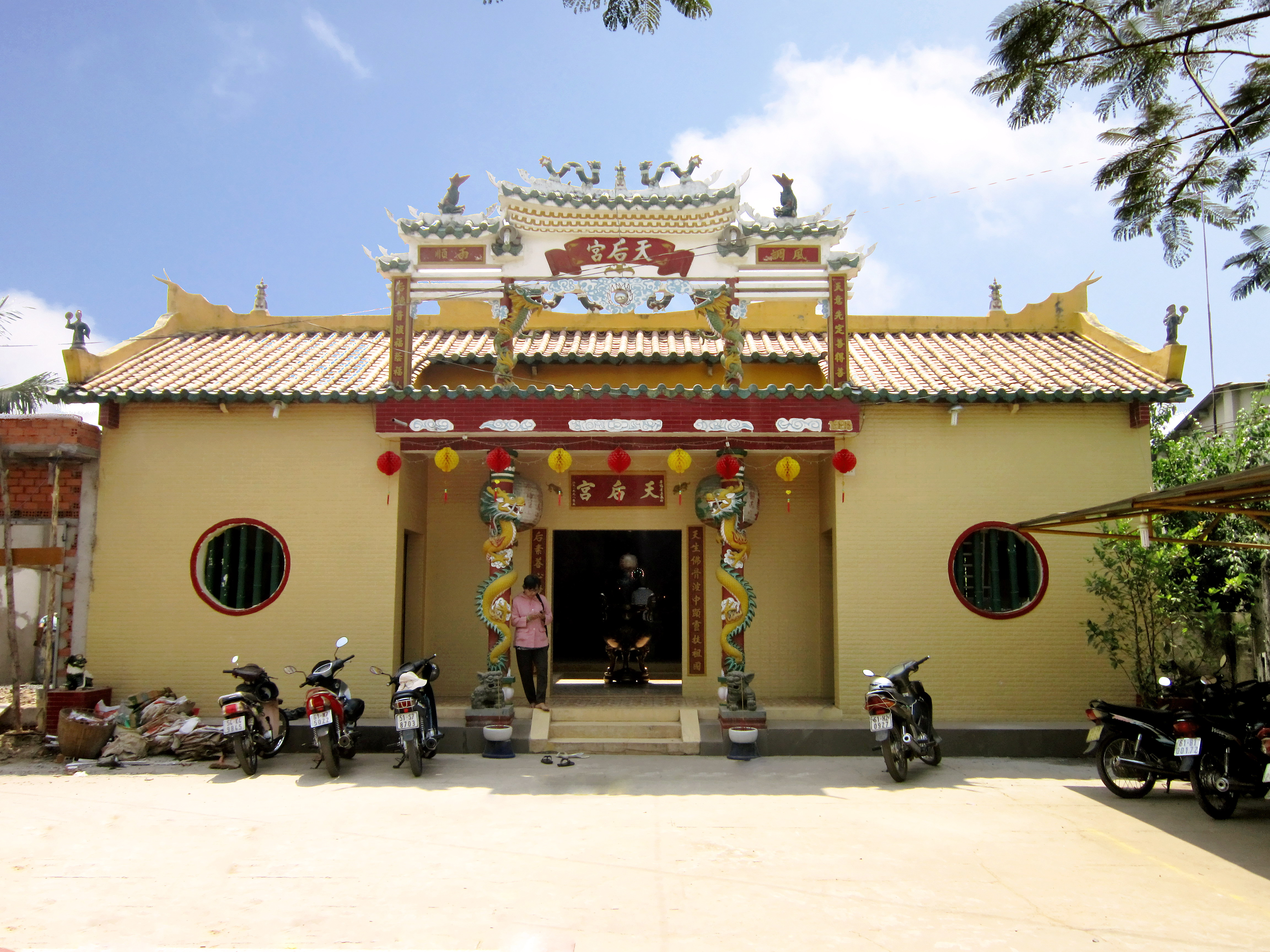 Miếu Bà Thiên Hậu ở bên rạch Hương Chủ Hiếu, thuộc thành phố Thủ Dầu Một, tỉnh Bình Dương, Việt Nam.